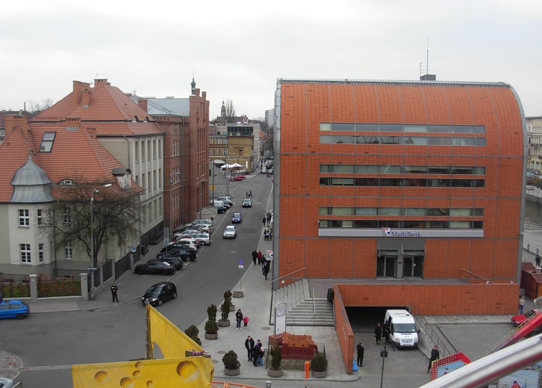 Ulica Grodzka w Bydgoszczy